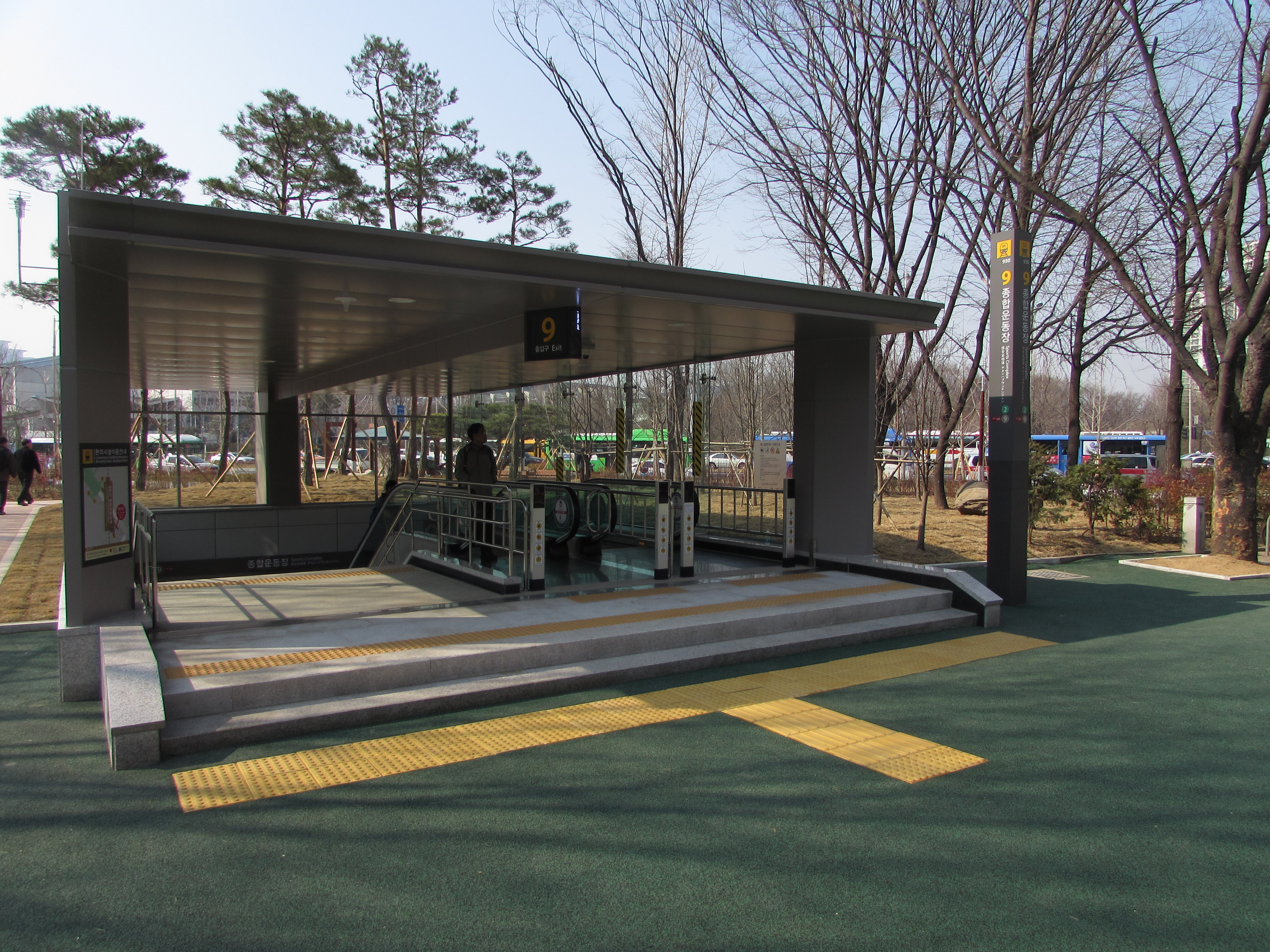 서울 지하철 9호선 종합운동장역 9번 출구.